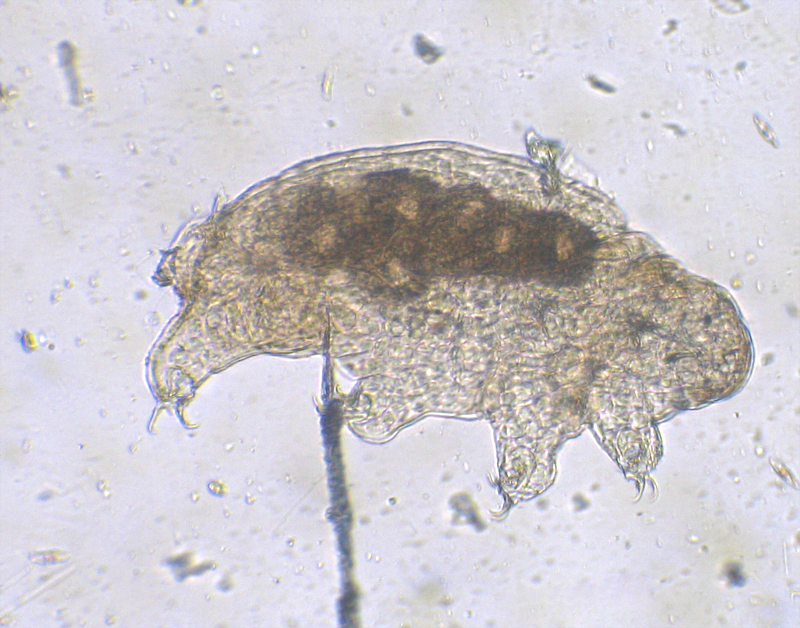 Tardigrada